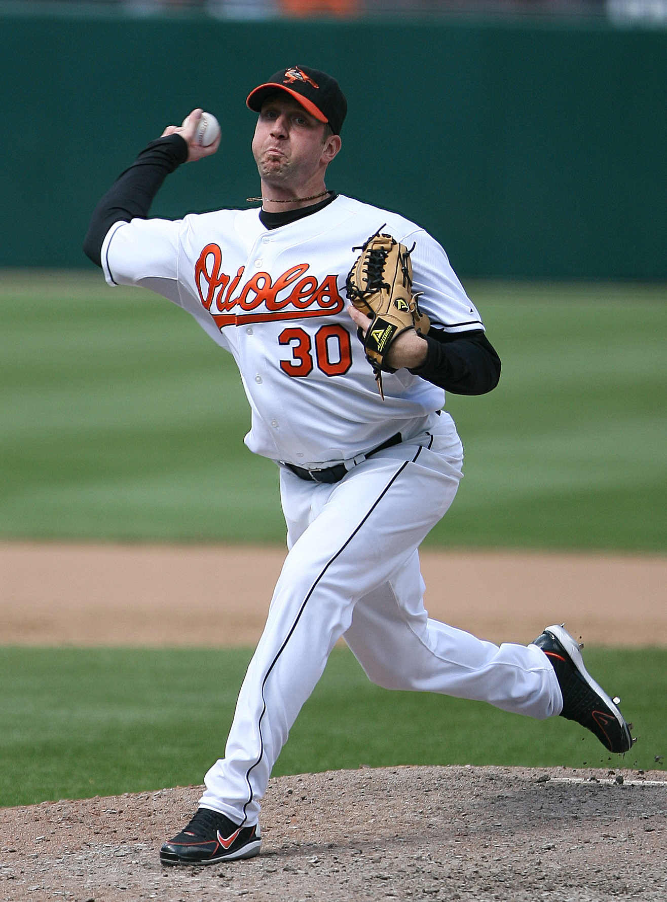 Todd Williams